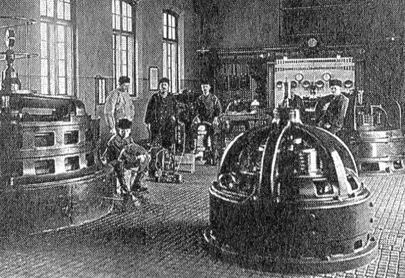 Avesta gamla kraftstation, GENERATORRUMMET 1906